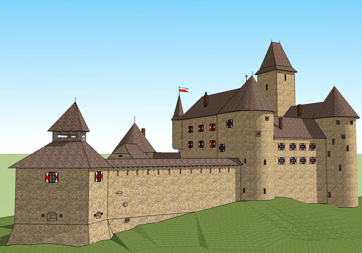 3D rekonstrukcija Starega gradu Samobor s programom SketchUp